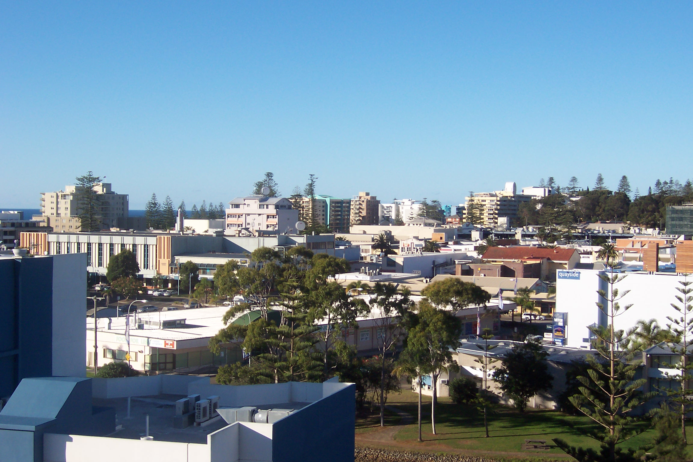 Centre ville de Port Macquarie, Nouvelle-Galles du Sud Australie